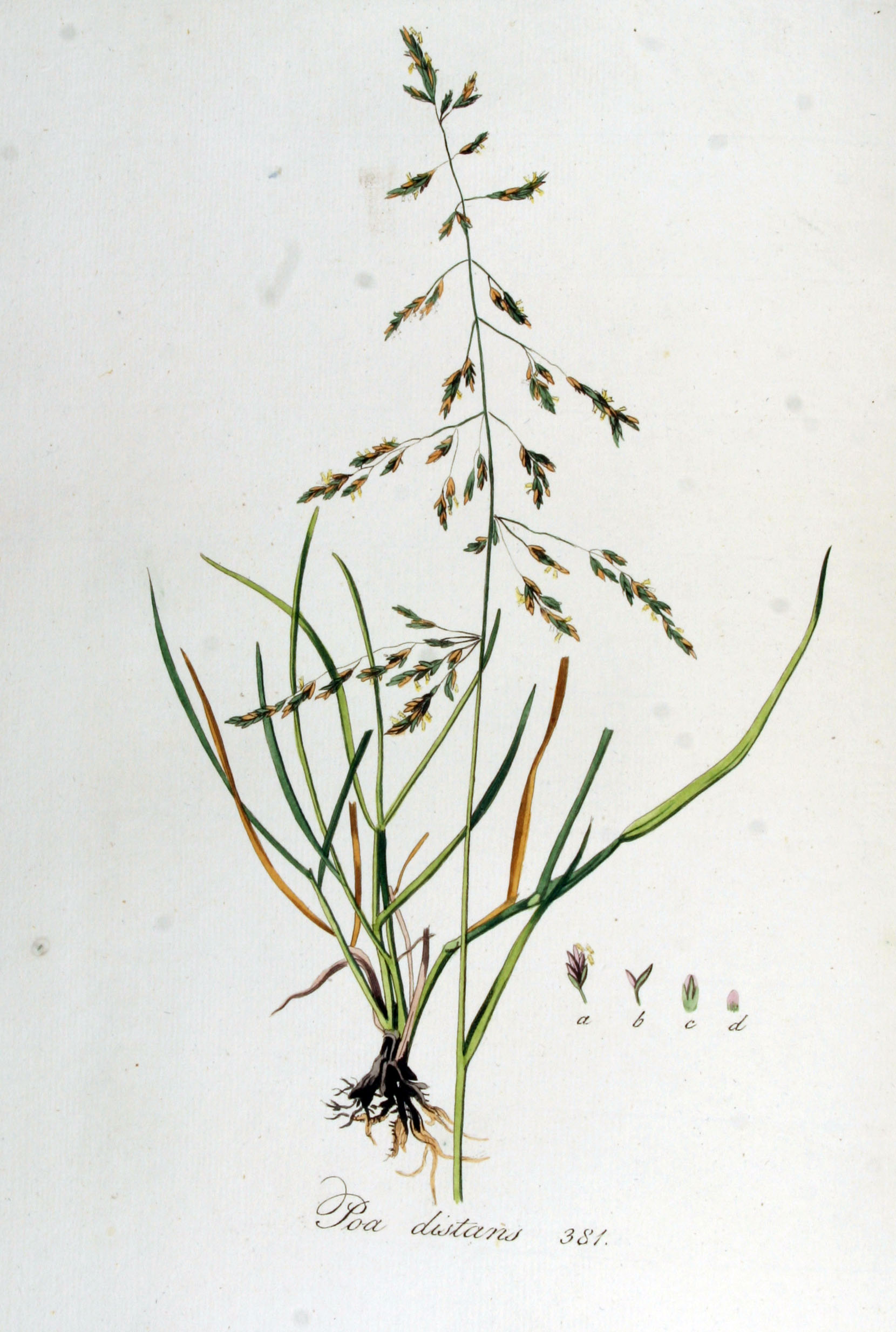 Puccinellia distans (L.) Parl. (Syn. Poa distans L.)